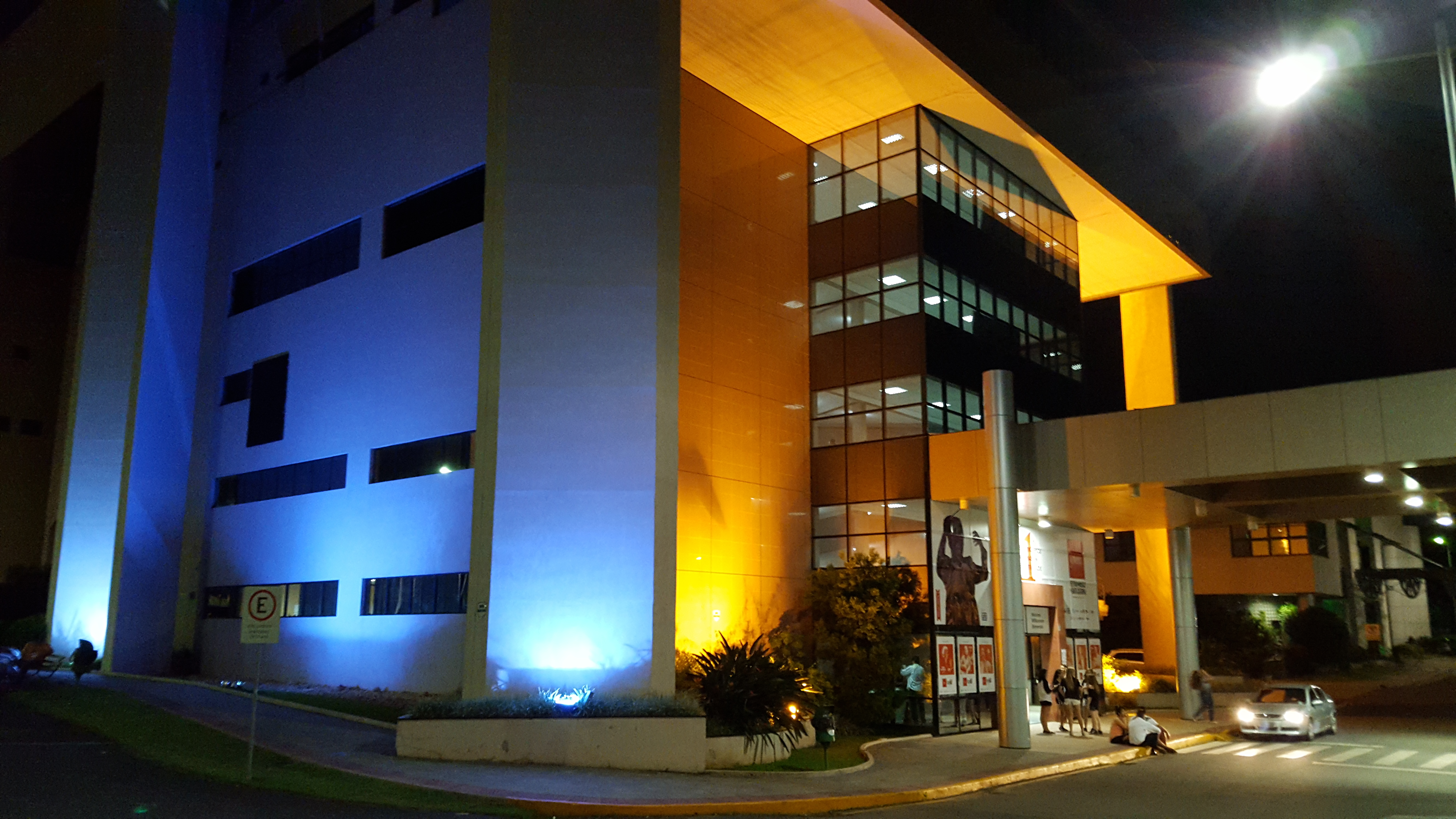 Visão externa do Scar - Sociedade Cultura Artística, em Jaraguá do Sul, Santa Catarina.